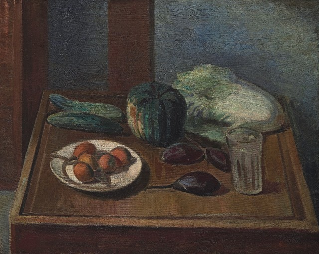 中文（台灣）: 李梅樹作品：《靜物》，1932，油畫。呈現尋常家常食物之樸實樣貌。